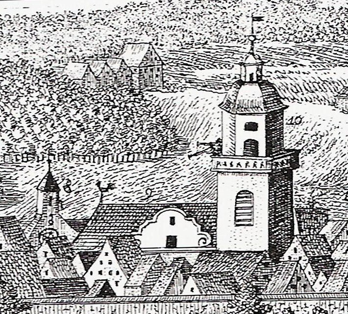 Stadtkirche Aalen